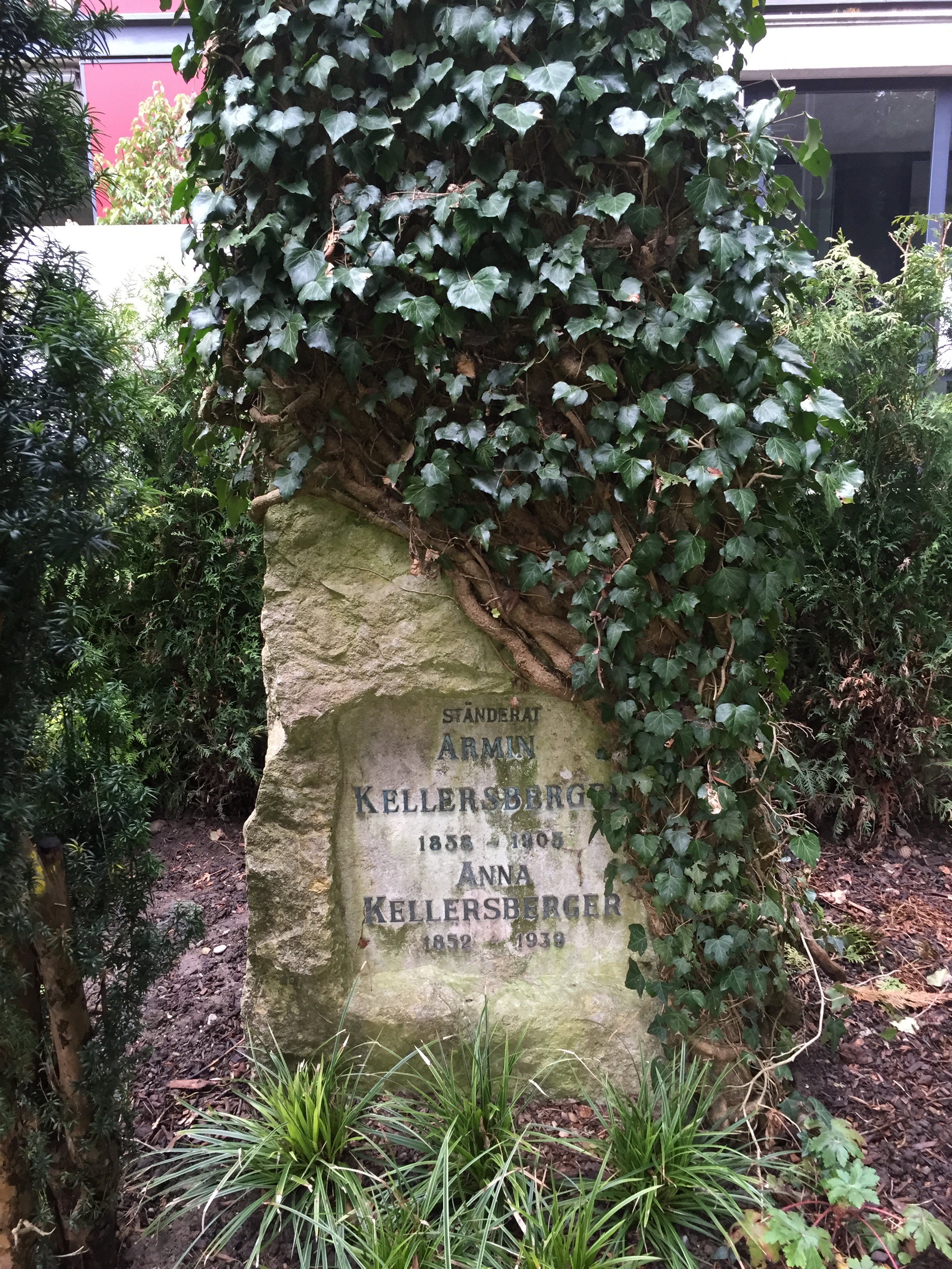 Familiengrab Kellersberger auf dem Alter Friedhof Baden